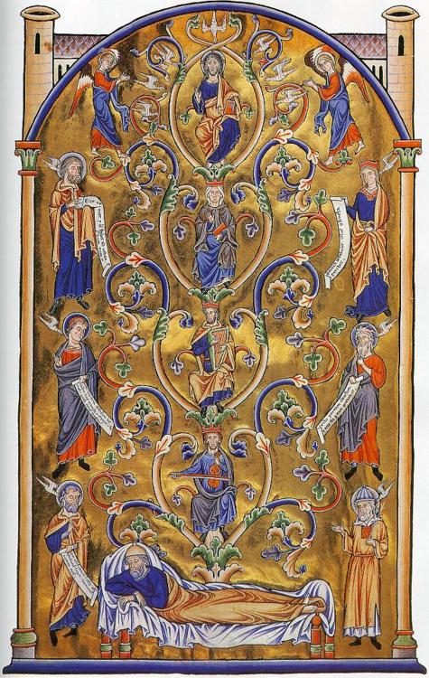 Arbre de Jessé du Psautier d'Ingeburge, au Musée Condé